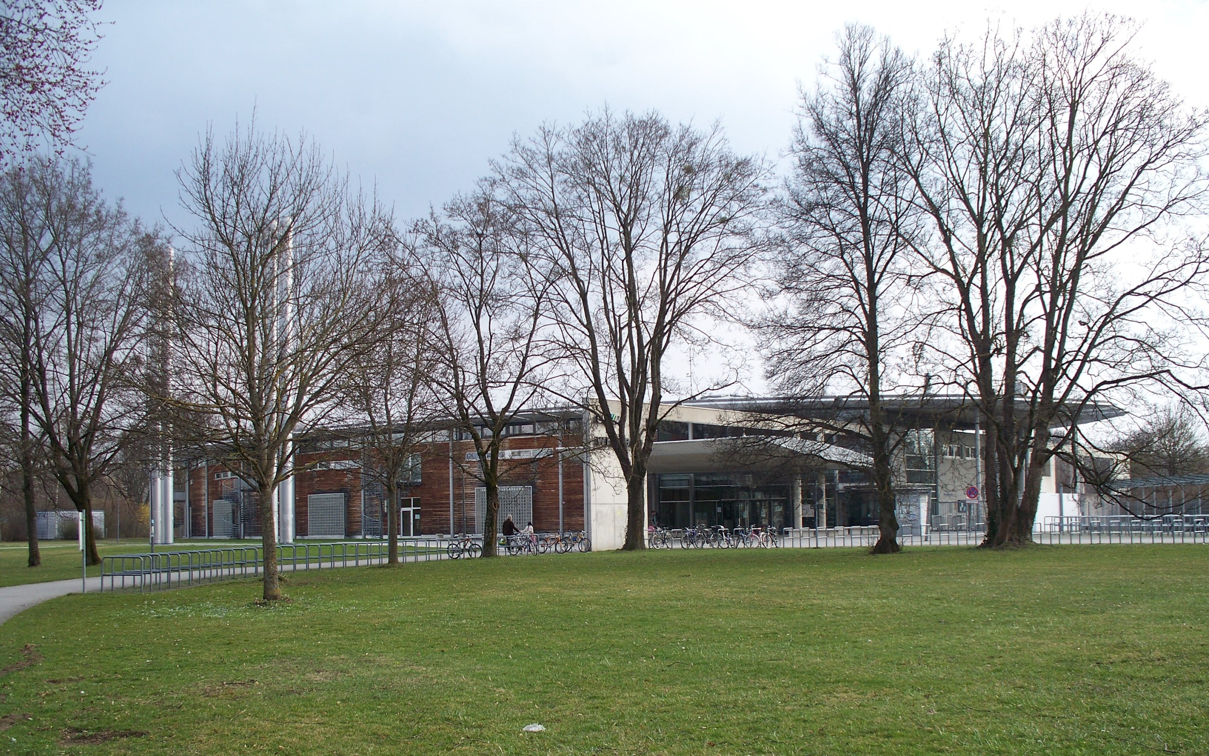 Das Westbad in der Weinbergerstraße im Münchener Stadtteil Pasing.